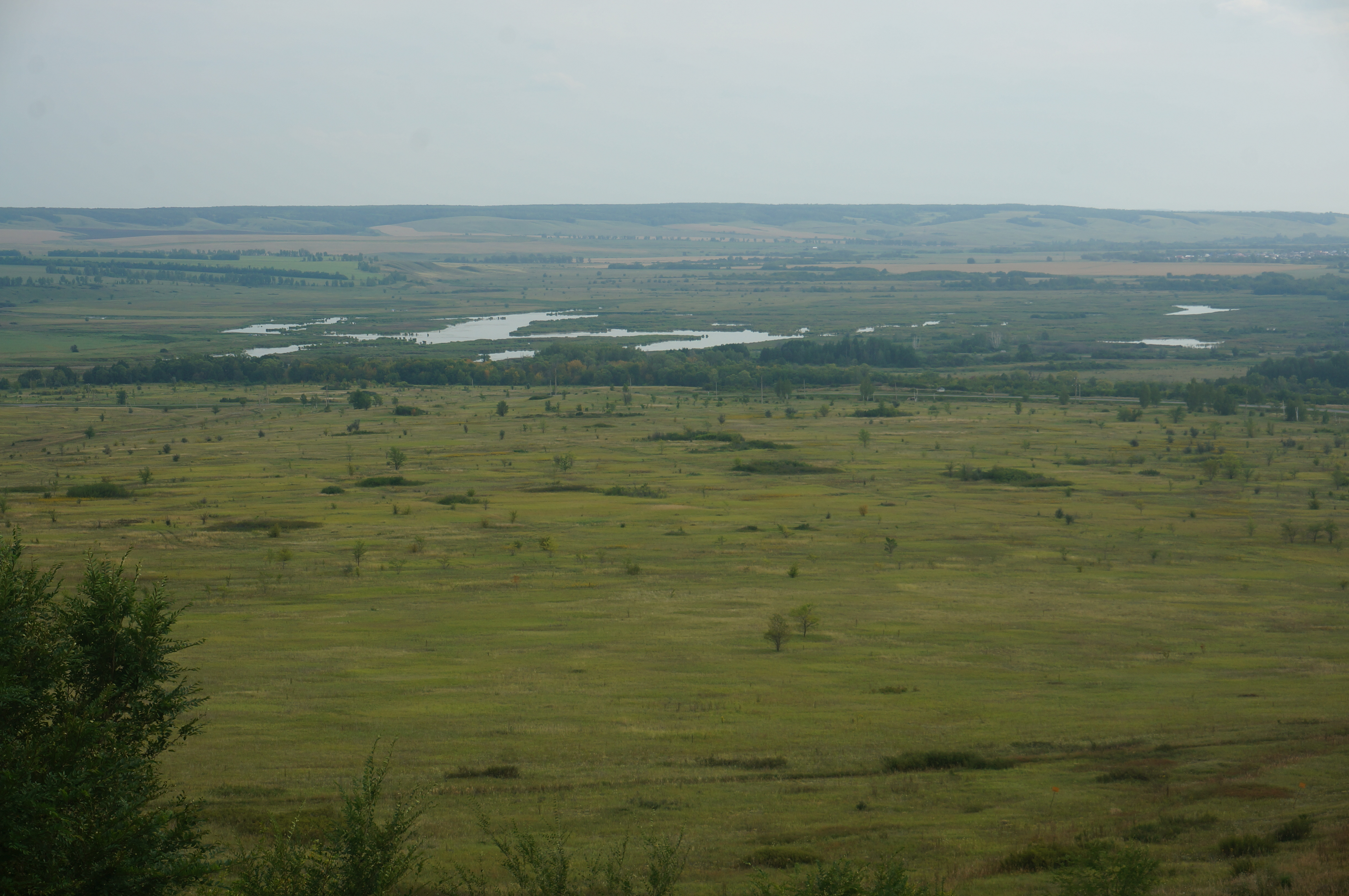 Вид с Серноводского шихана в южную сторону. Чувашские озера, Сергиевский район Самарской области, Россия